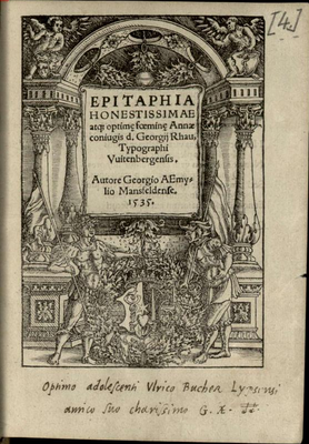 Epitaphia honestissimae atque optime fominae Annae coniugis d. Georgii Rhau ..., 1535, Georg Aemilius (1517-1569)